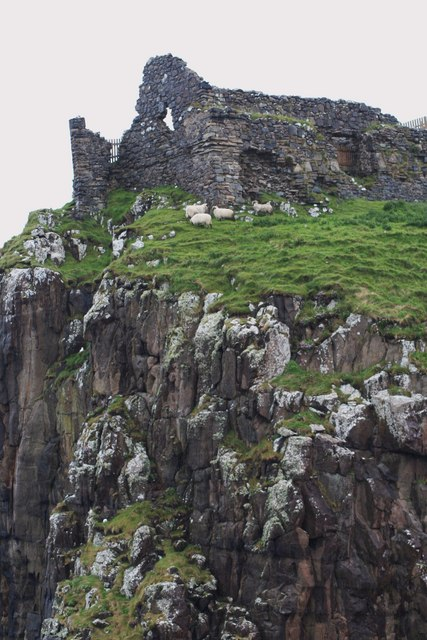 Duntulm Castle